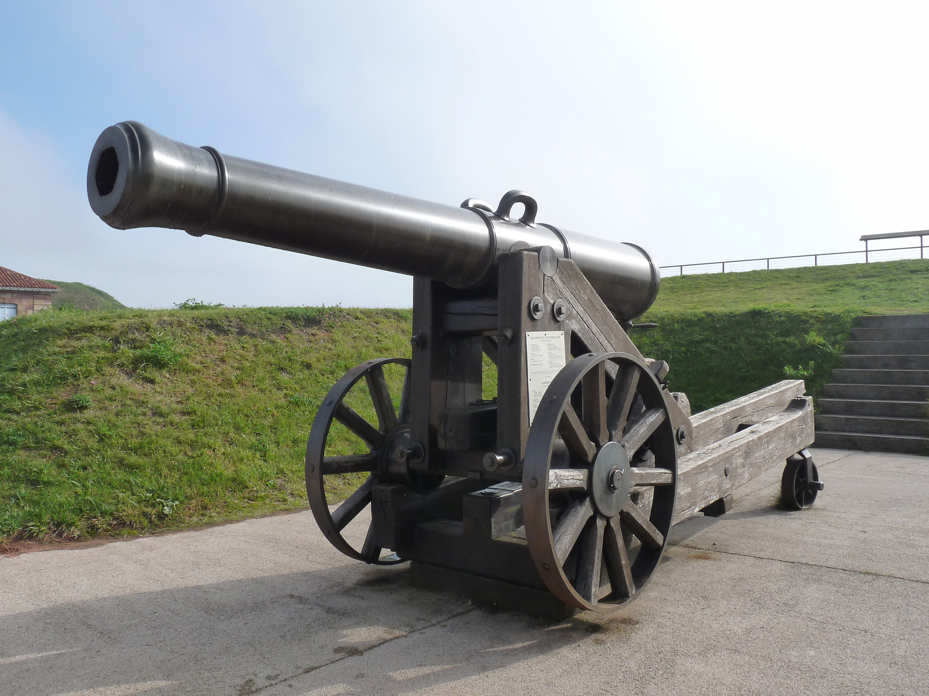 Citadelle de Bitche : Copie à l'identique d'un canon de place rayé de 24 (modèle 1861-1864) en usage lors du siège de Bitche. Poids total de la pièce : 4631 kg